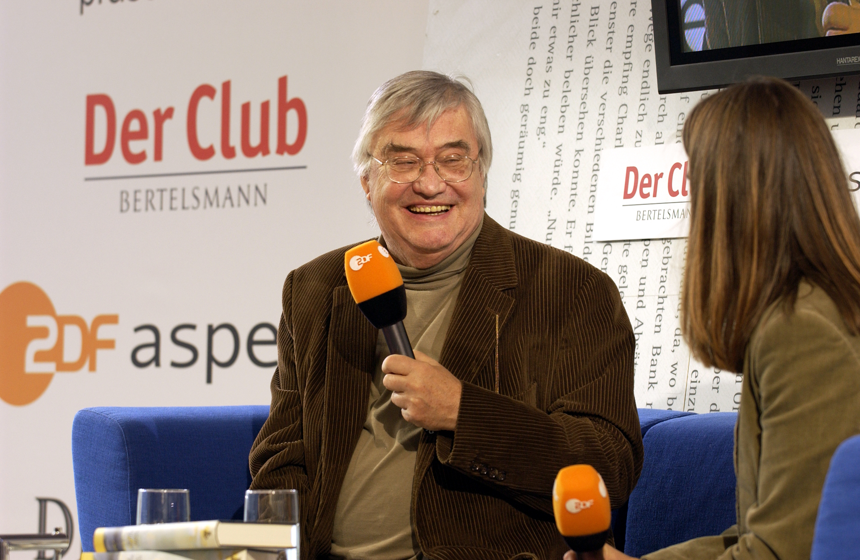 Dieses Fotos dürfen Sie honorarfrei nutzen, wenn Sie folgenden credit beachten: Copyright: Das blaue Sofa / Club Bertelsmann. Peter Härtling wurde 1933 in Chemnitz geboren. Er arbeitete als Redakteur und Herausgeber bei Zeitungen und Zeitschriften. Anfang 1967 Cheflektor des S. Fischer Verlages in Frankfurt a.M., dort von 1968 bis 1973 Sprecher der Geschäftsleitung, seit 1974 freier Schriftsteller. Zahlreiche Preise und Auszeichnungen.